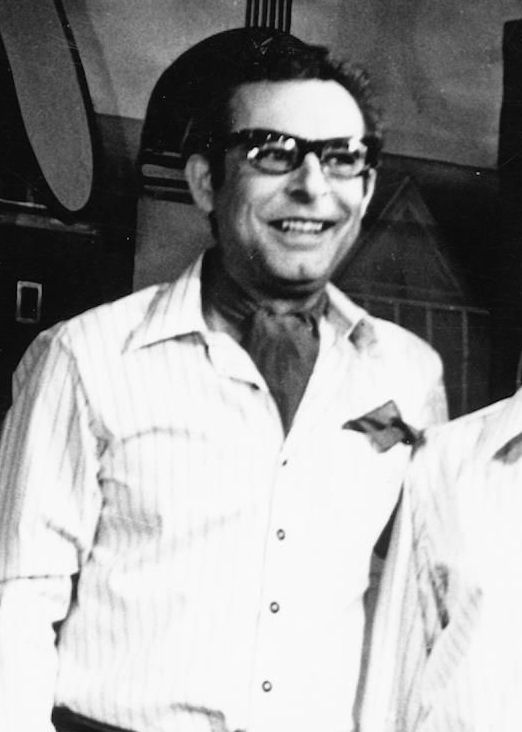 Gálfy László a békéscsabai Jókai Színházban